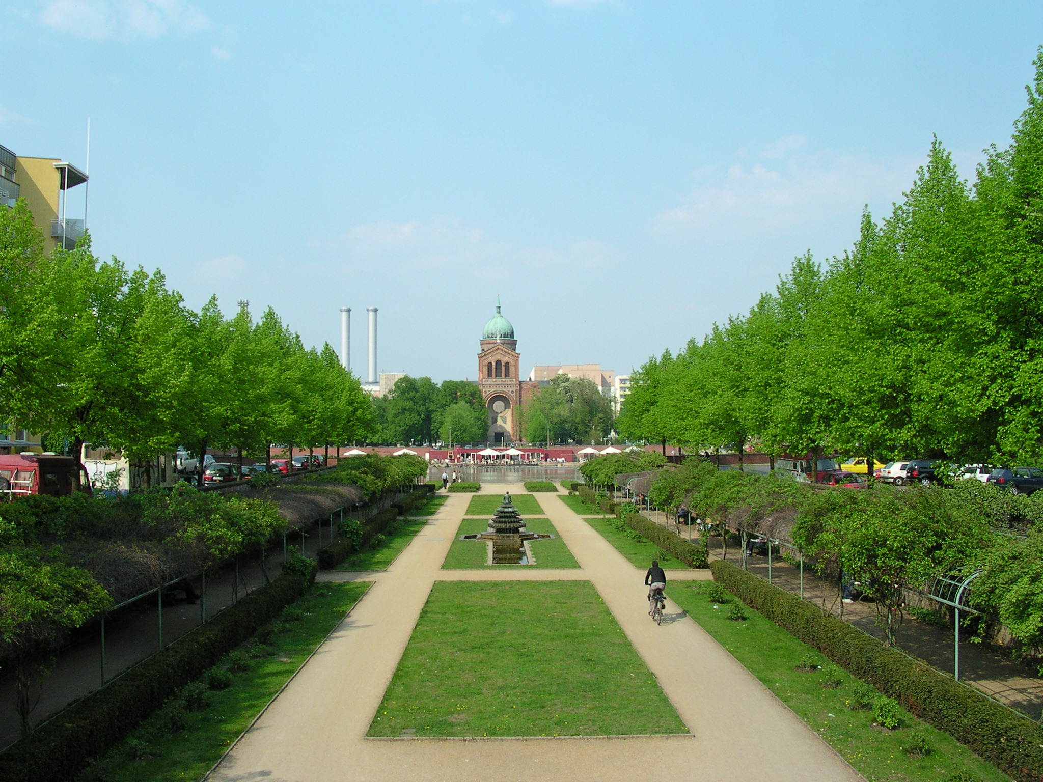 Berlin, Engelbecken im Vordergrund und Sankt Michaelskirche im Hintergrund